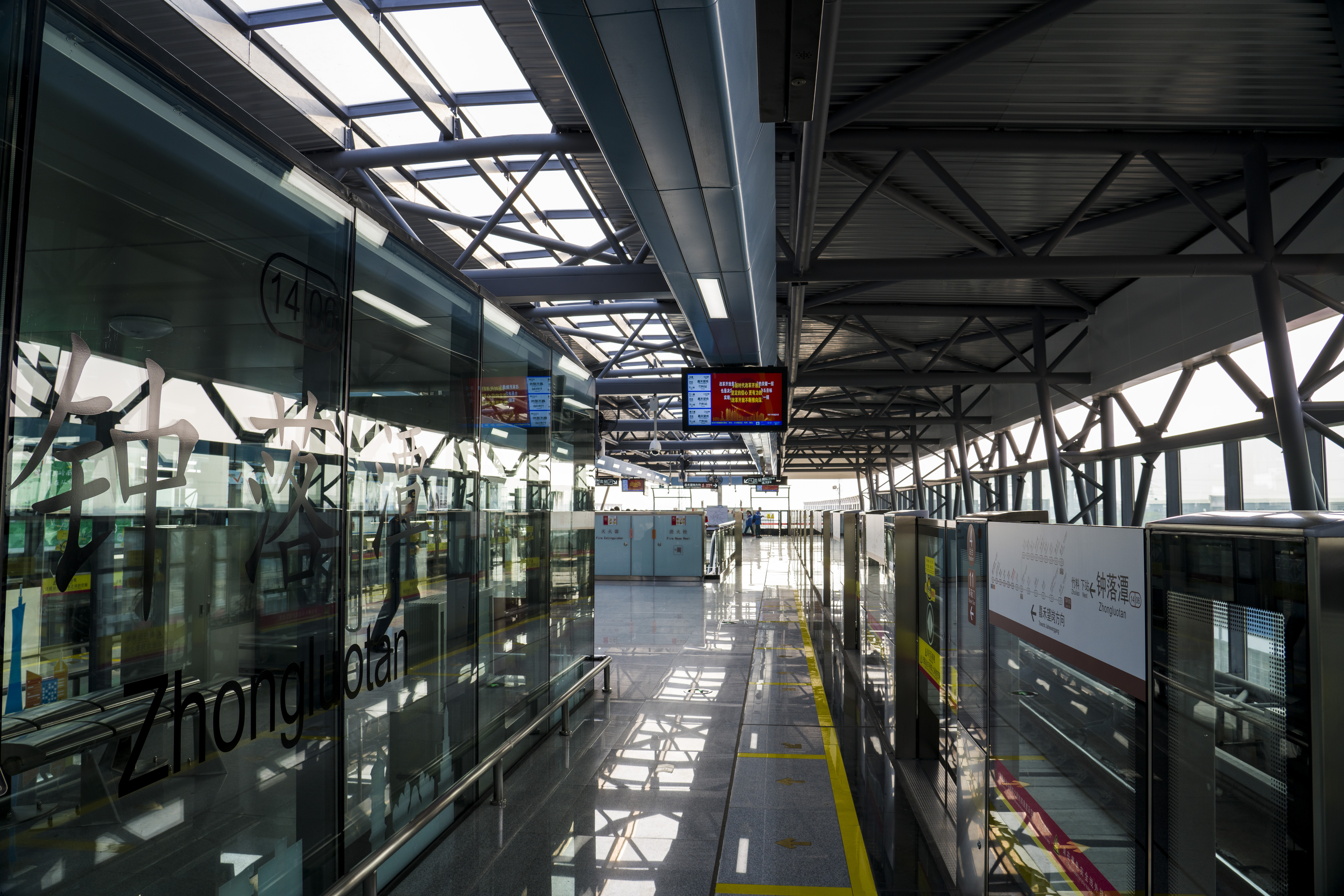 钟落潭站4号月台